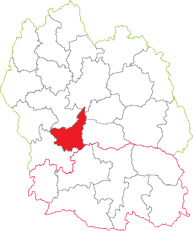 Situation du canton dans le département de la Lozère (France)